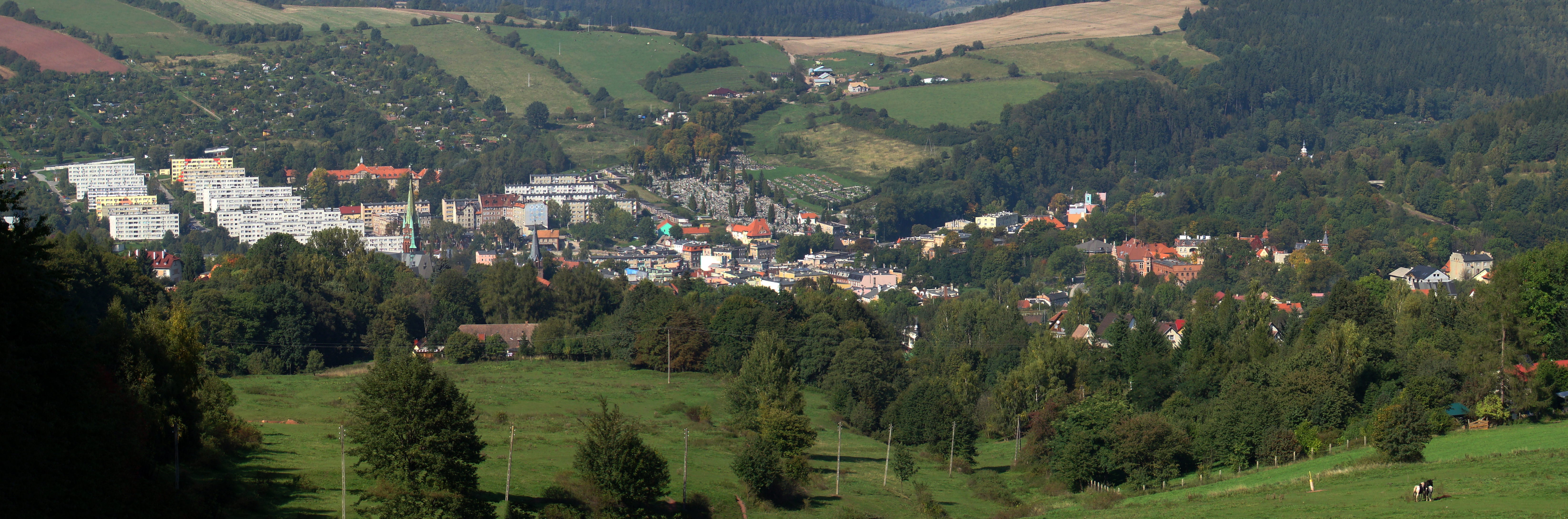 Panorama miasta Nowa Ruda z ulicy Kołowej 08.1959.